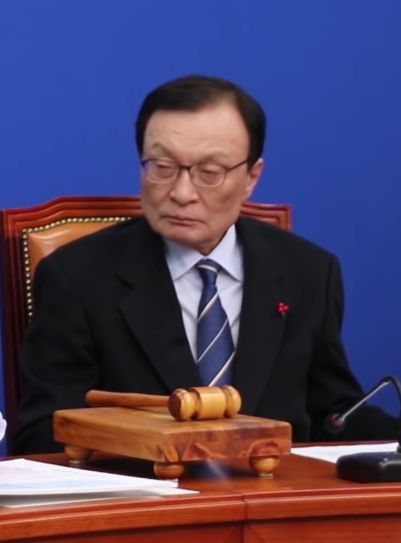 박주민 최고연설을 경청하는 이해찬 대표.